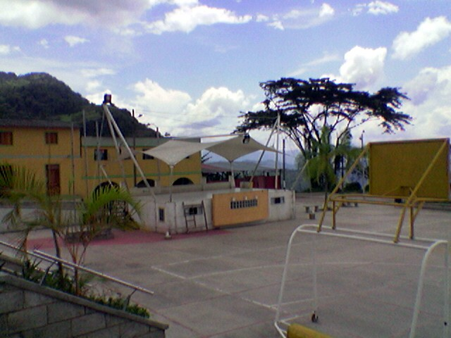 Parque principal de Maripí Boyacá